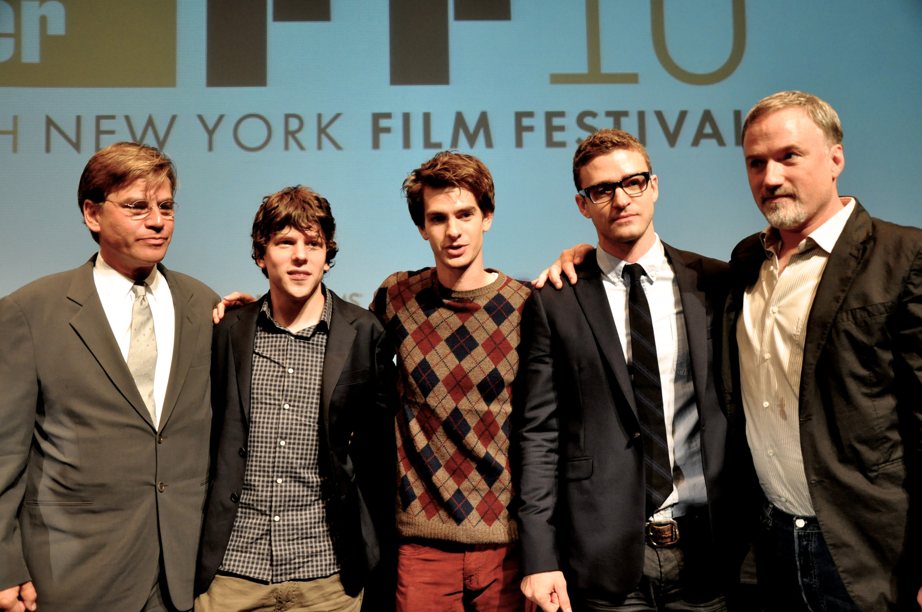 De izquierda a derecha: el guionista Aaron Sorkin, los actores Jesse Eisenberg, Andrew Garfield y Justin Timberlake y el director David Fincher en el estreno de The social network en el Festival de Cine de Nueva York. 24 de septiembre de 2010.